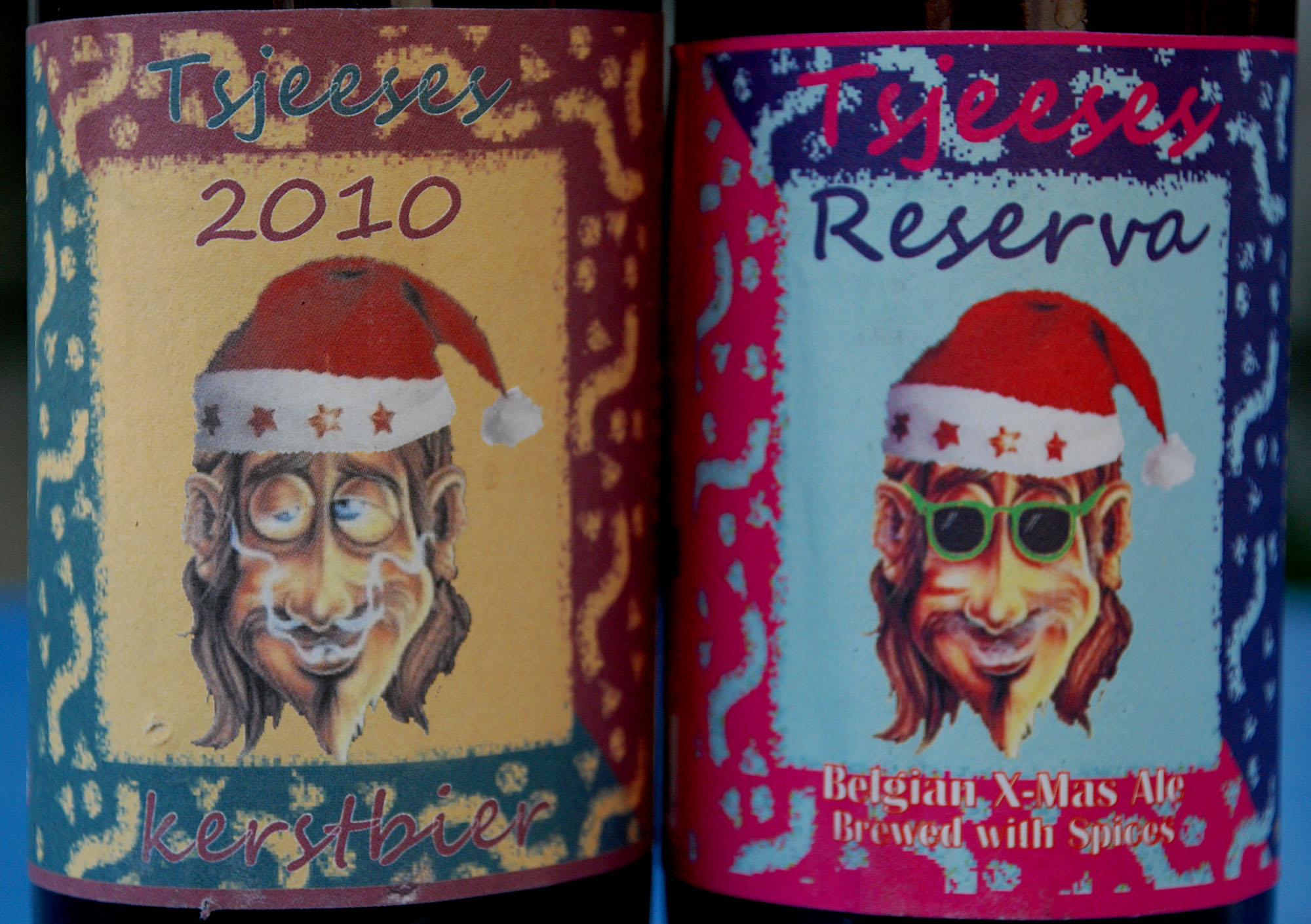 Tsjeeses bieretiketten